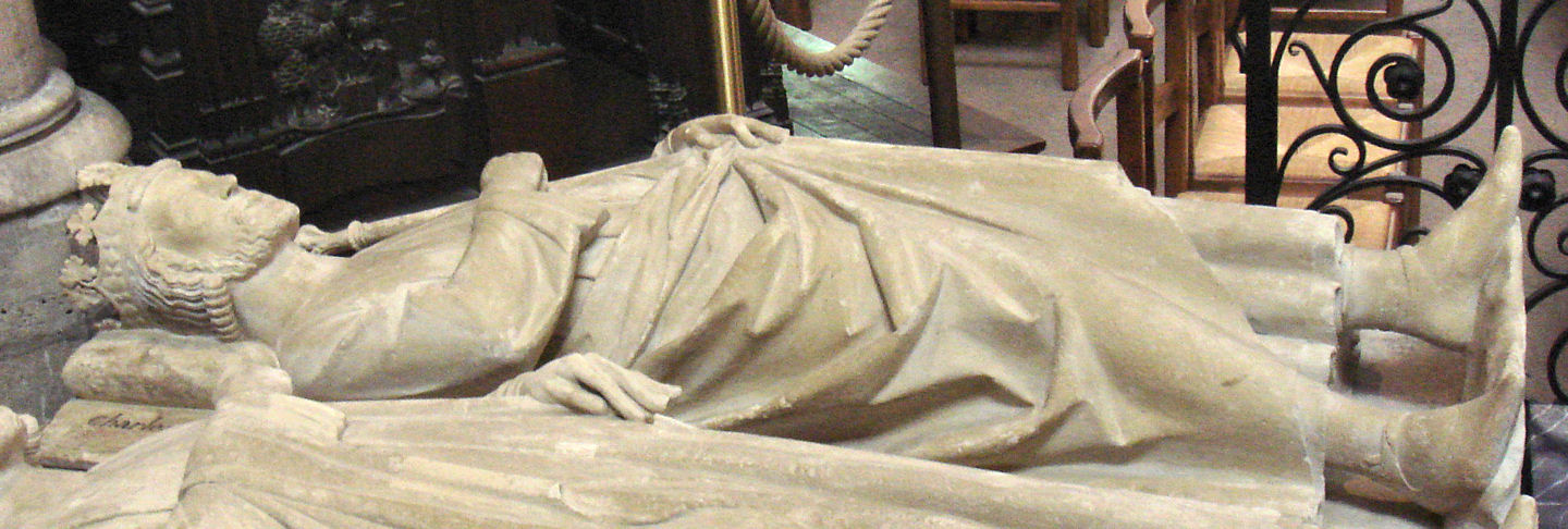 Tomb of Charles_Martel, Basilique Saint_Denis